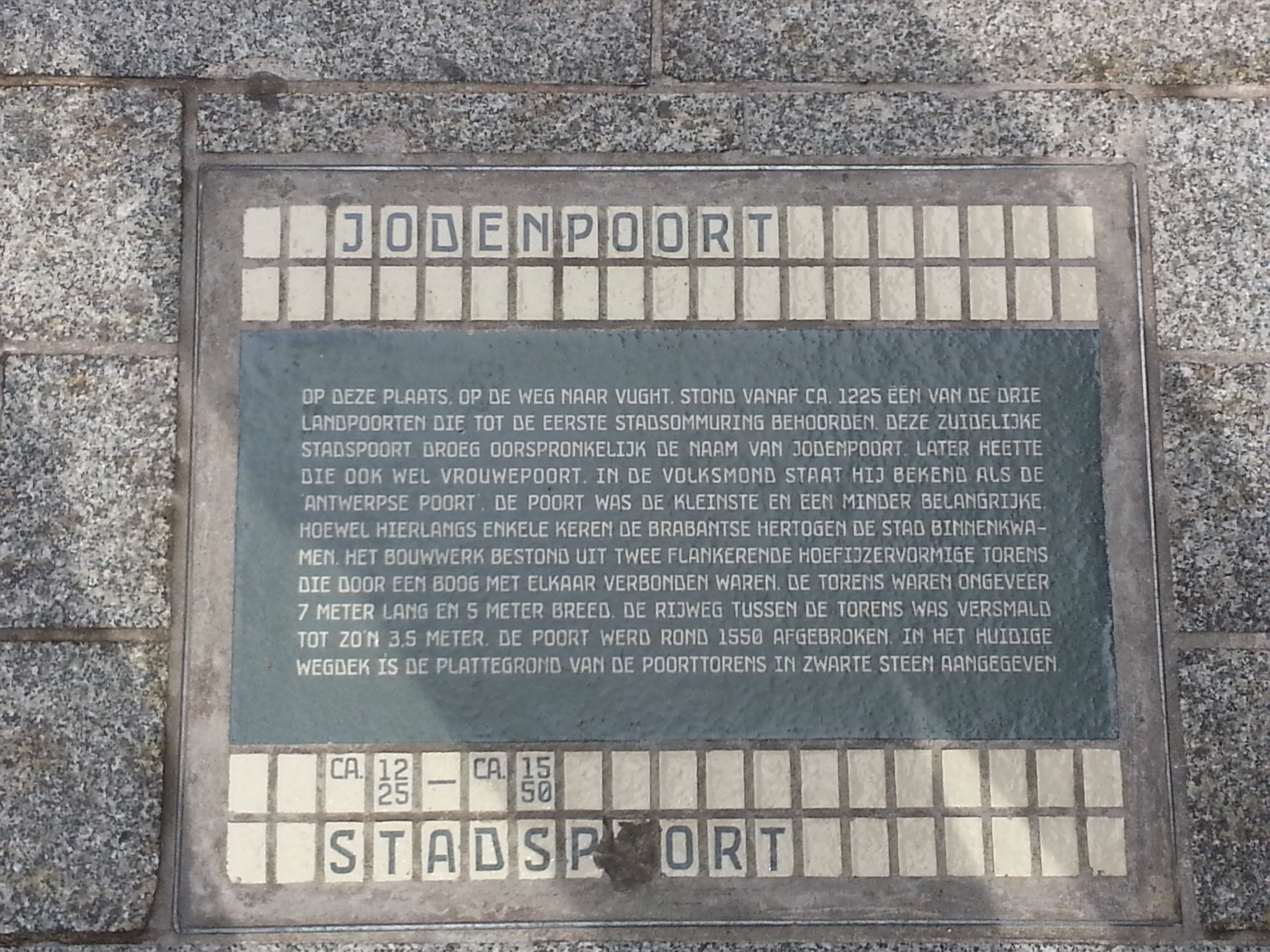 Antwerpse Poort, 's-Hertogenbosch tekst